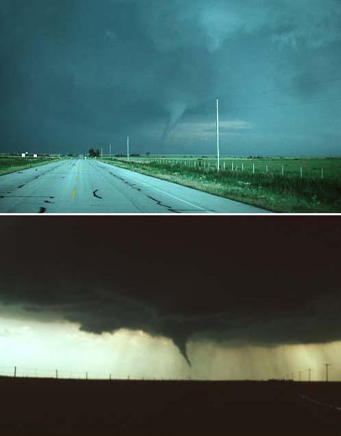 Montage of Image:Waurika Oklahoma Tornado Front-Lit.jpg and Image:Waurika Oklahoma Tornado.jpg